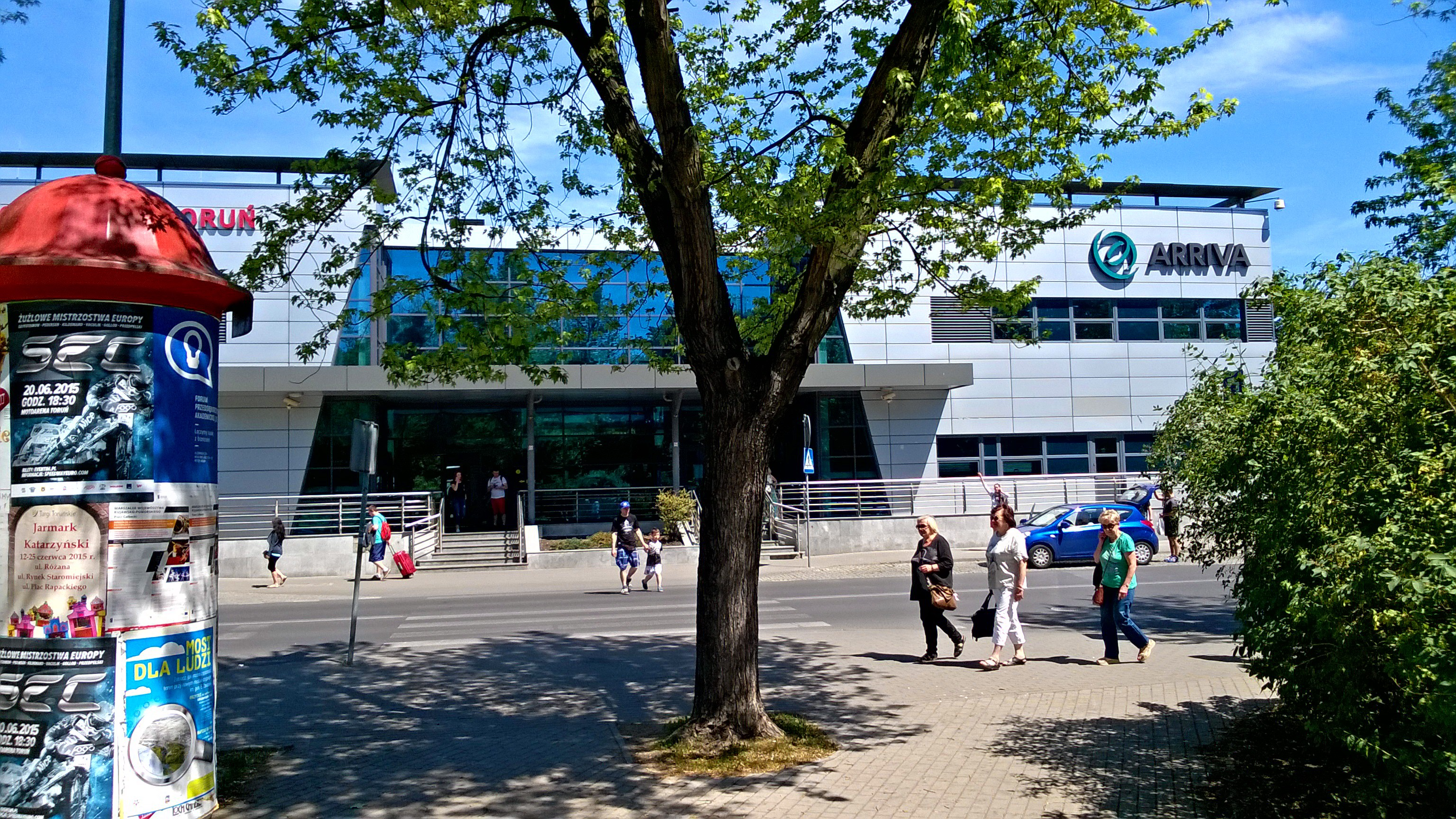 dworzec autobusowy w Toruniu1